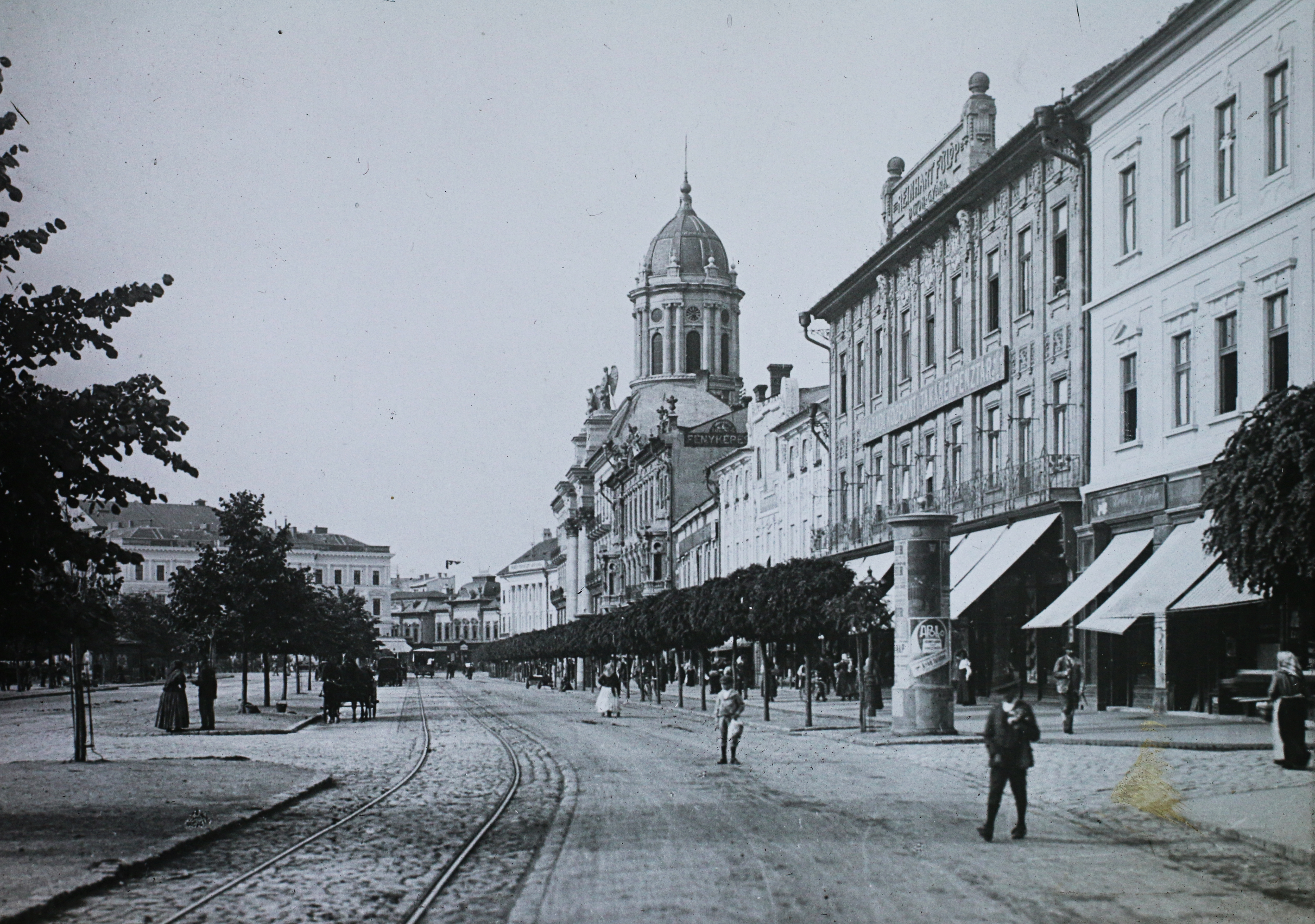 Andrássy tér (Bulevardul Revolutiei). Location: Romania, Transylvania, Arad Tags: ad pillar, street view, rails, alley, awning Title: Andrássy tér (Bulevardul Revolutiei).